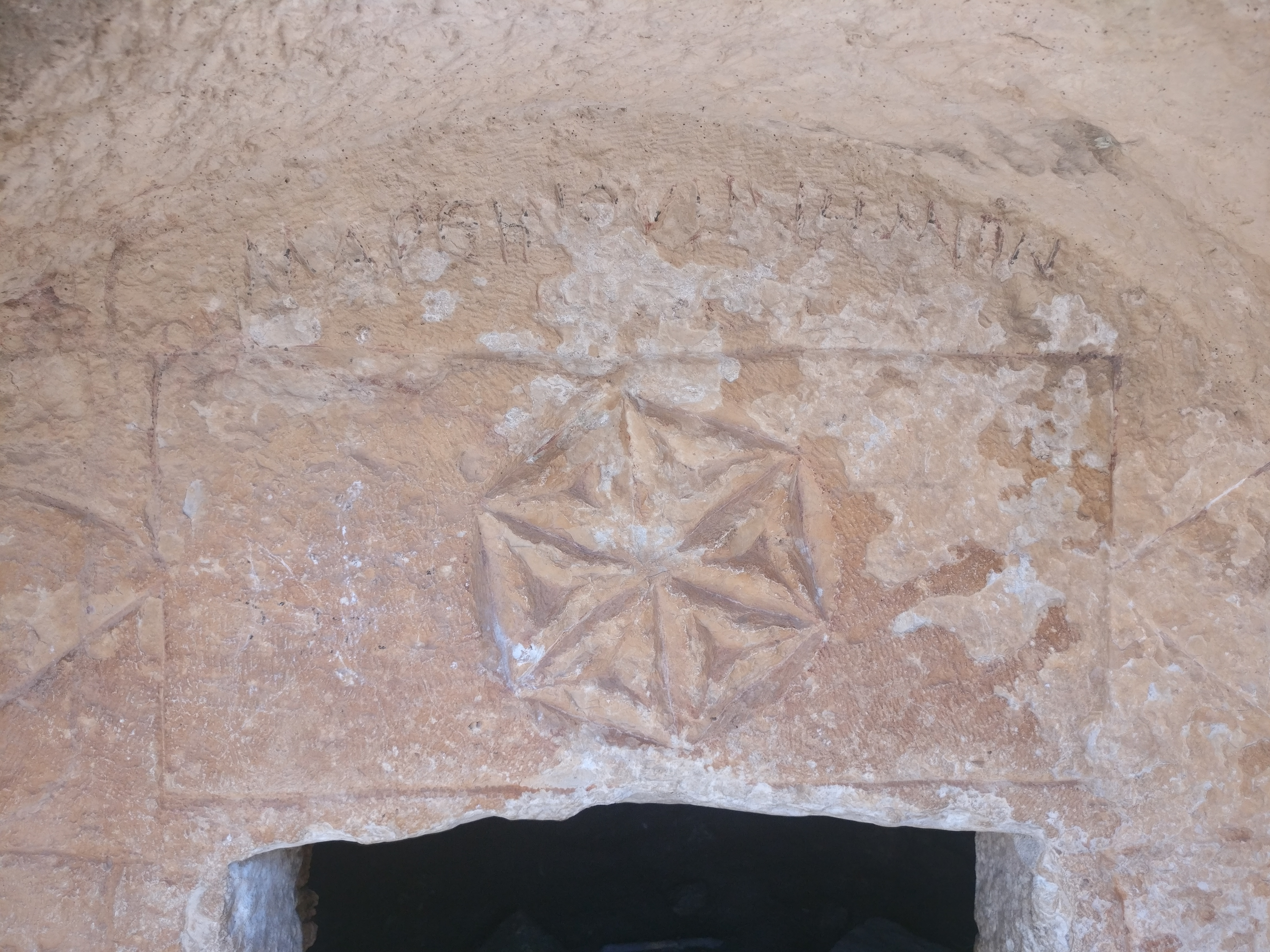 פתח מערת רקית בכרמל: כתובת ביוונית חקוקה בתוך מסגרת בצורת טבלת אזניים